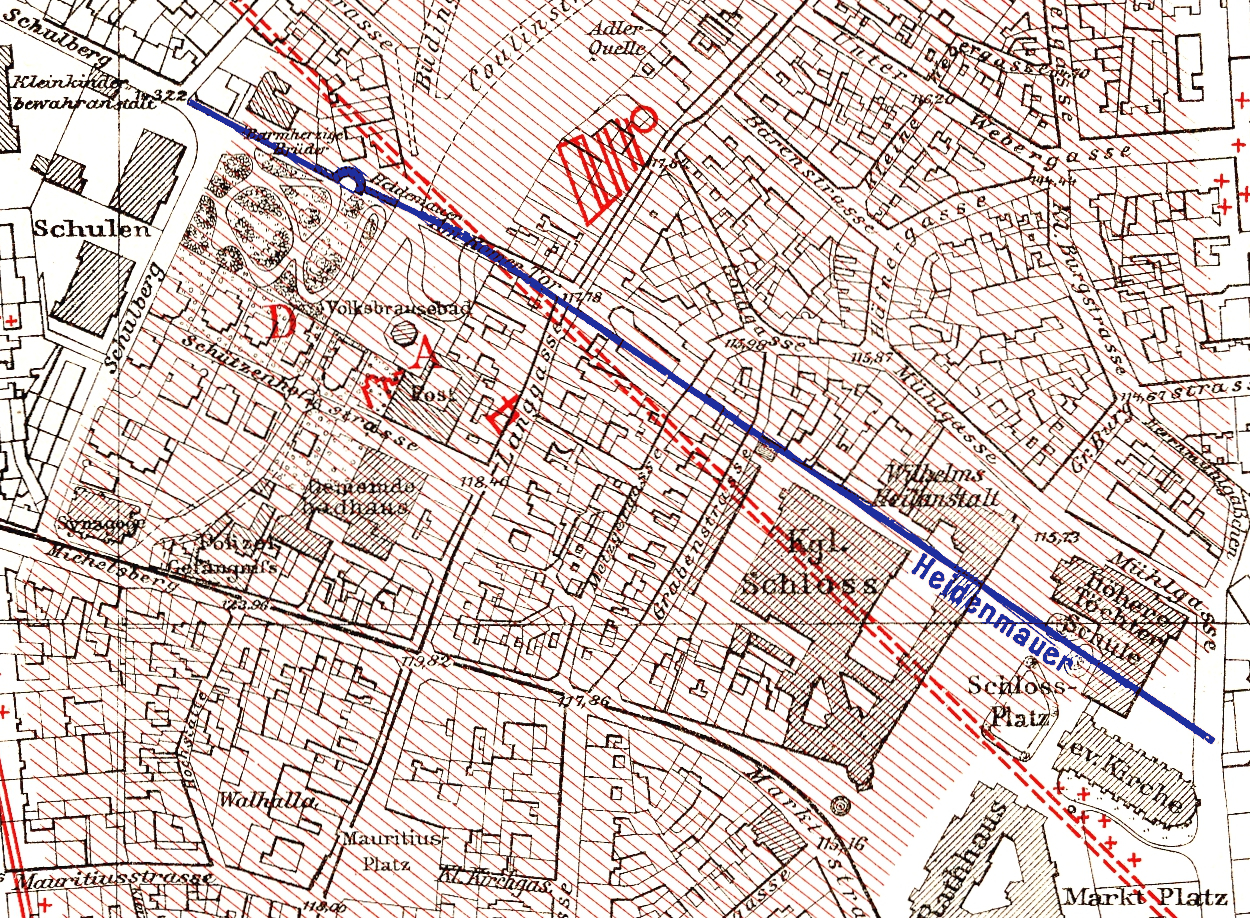 Ausschnitt aus File:ORL B 2 3b Taf 1 Kastell Wiesbaden.jpg, die spätantike Heidenmauer blau hervorgehoben.